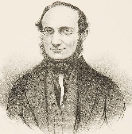 Adolf Aronheim (geb. 18. Januar 1818 in Braunschweig; gest. 18. April 1880 ebd.), deutscher Jurist und Politiker jüdischen Glaubens.